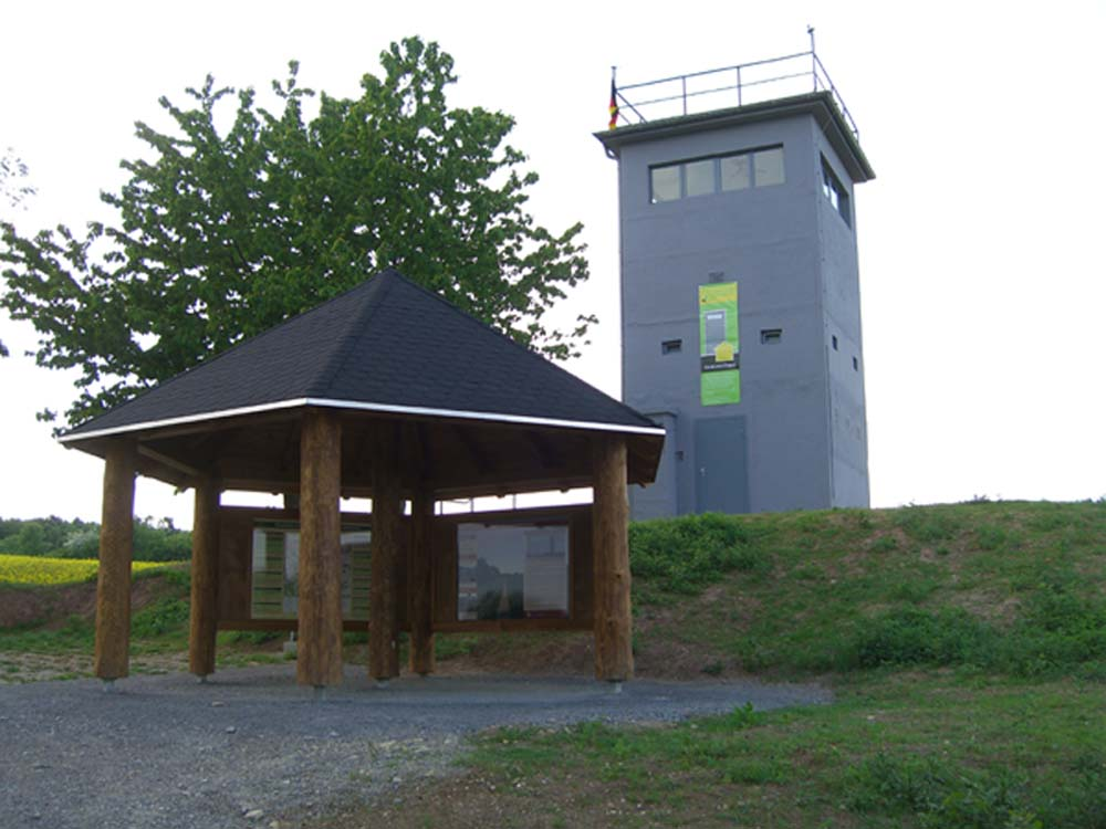 Hier sieht man den zum Museum hergerichteten, ehemaligen Grenzturm mit einem neu errichteten Informationspavillion über das "Grüne Band" und Wandermöglichkeiten in der Region.